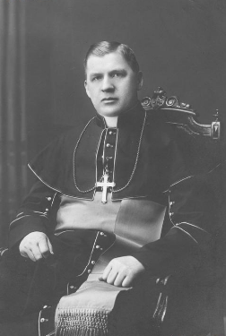 Ks. Władysław Marcin Faron - biskup Polskiego Narodowego Kościoła Katolickiego.